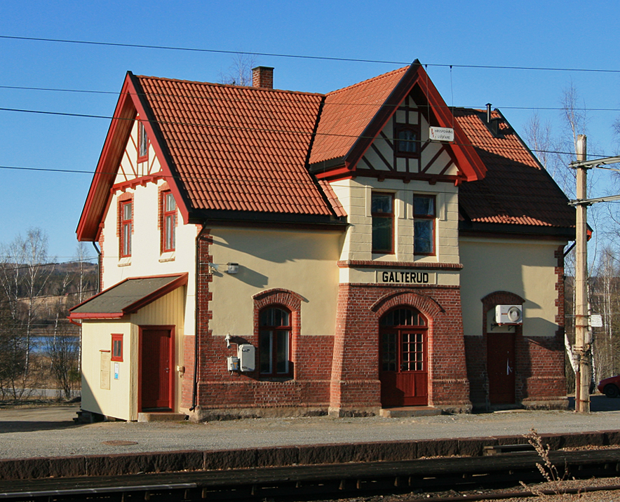 Galterud stasjon, Sør-Odal kommune, Kongsvingerbanen. Bygd 1903; arkitekt Paul Due.